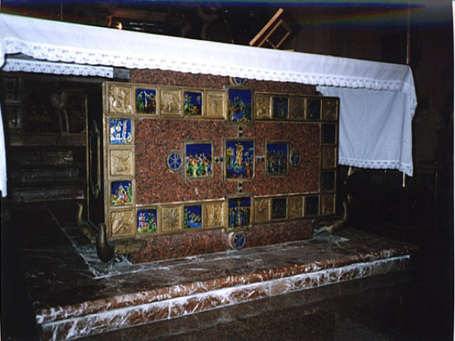 Altare c/o San Domenico di Catania (smalto su argento) - Opera propria